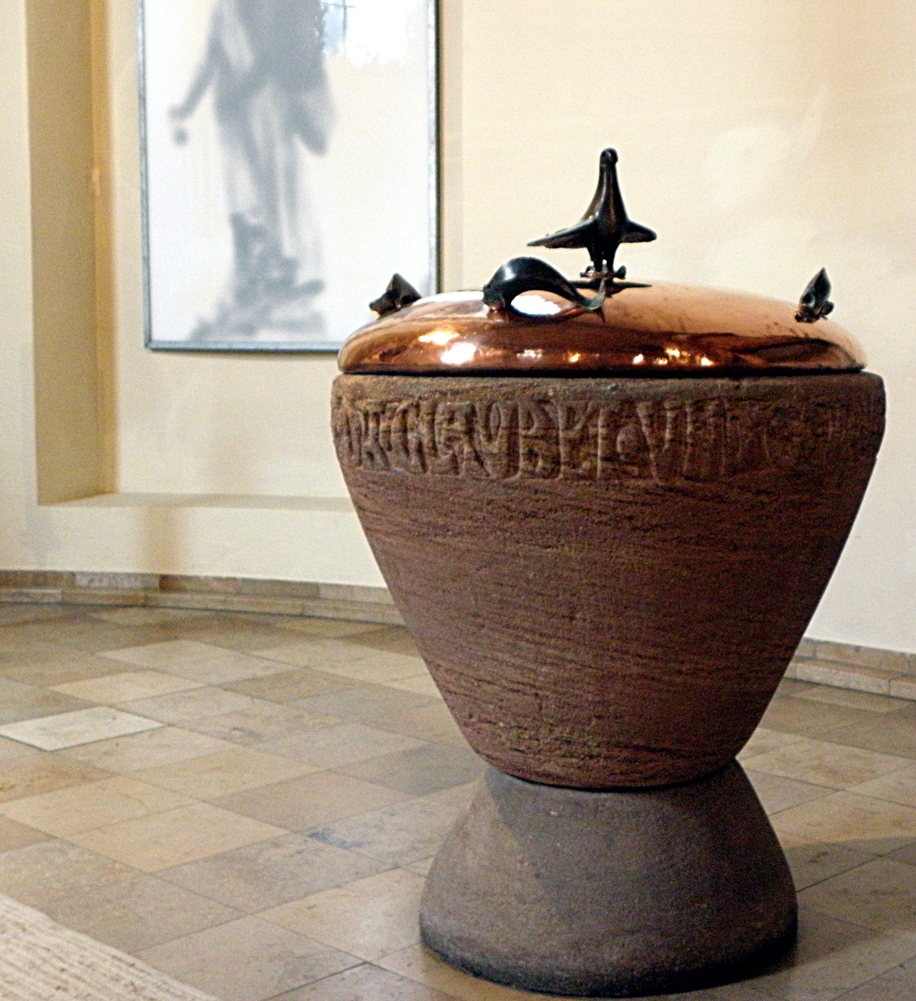 Fürth, Auferstehungskirche